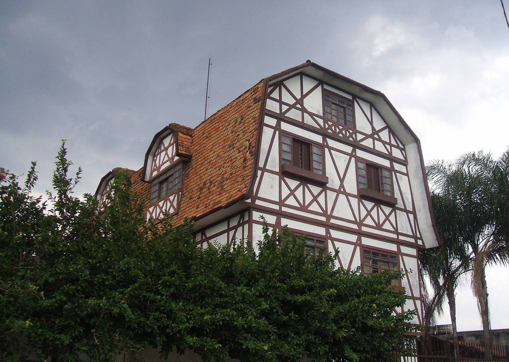 Edifício no Alto do Jaguaré, próximo à torre do relógio. Cidade de São Paulo, Brasil.